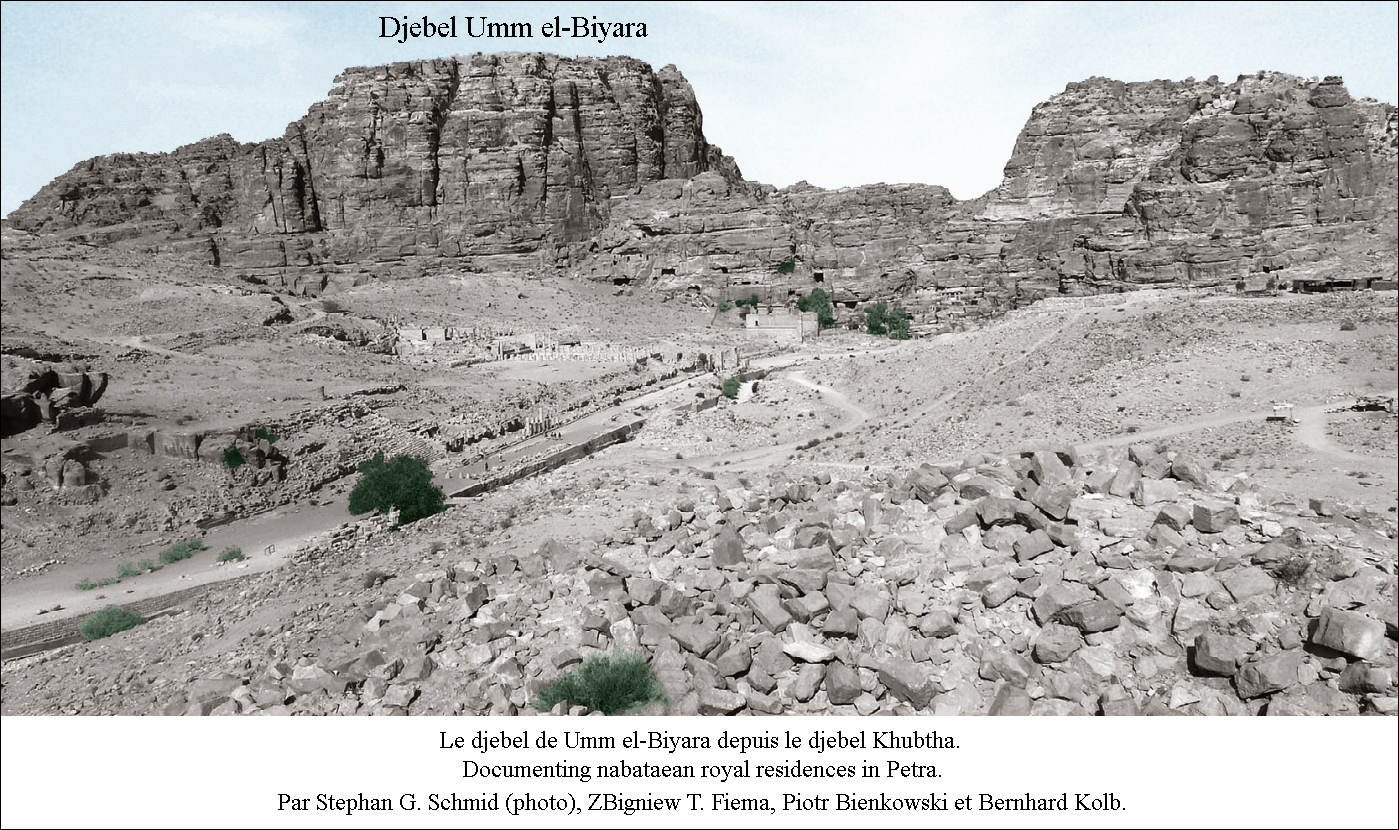 Le djebel de Umm Biyara depuis le djebel de Khubthah, avec Pétra au centre.